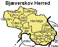 Bjæverskov Herred Præstø Amt , Denmark.